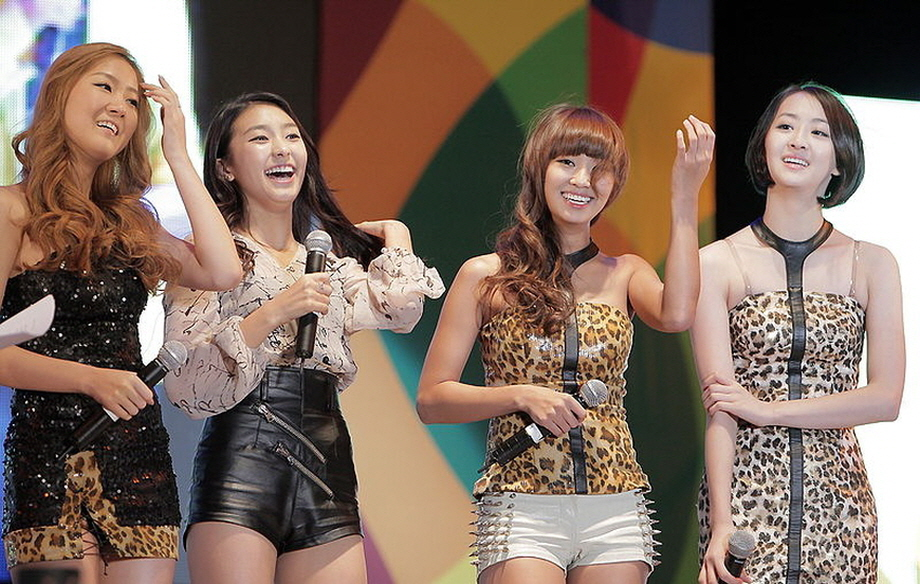 2011. 10. 02. 점프구로 폐막공연 컬투쇼 공개방송 씨스타 _ so cool 1280p